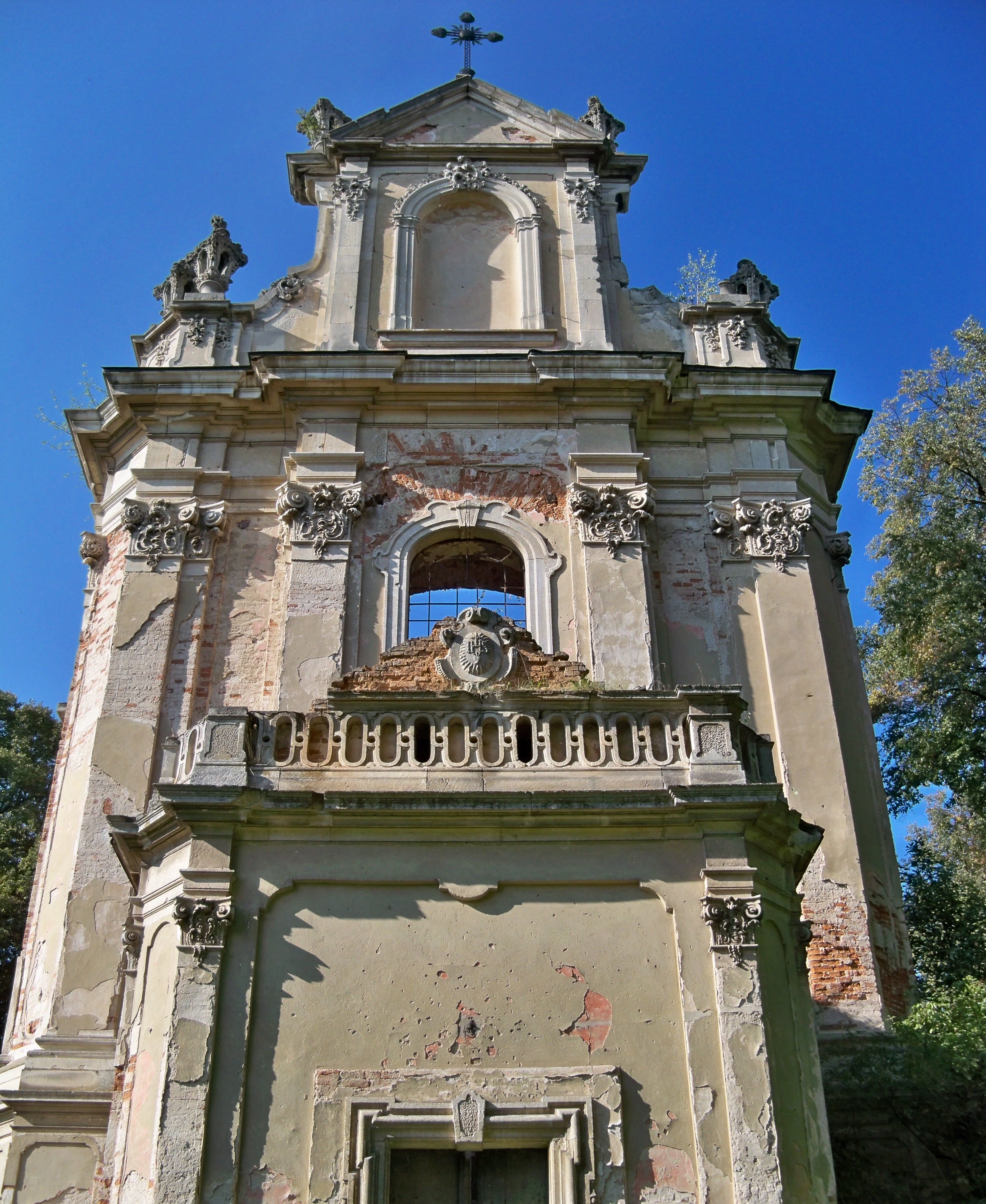 Костел Всіх Святих (мур.), с.Годовиця